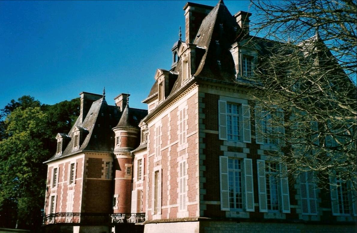 Château de Lonné sur la commune d'Igé dans l'Orne (61)